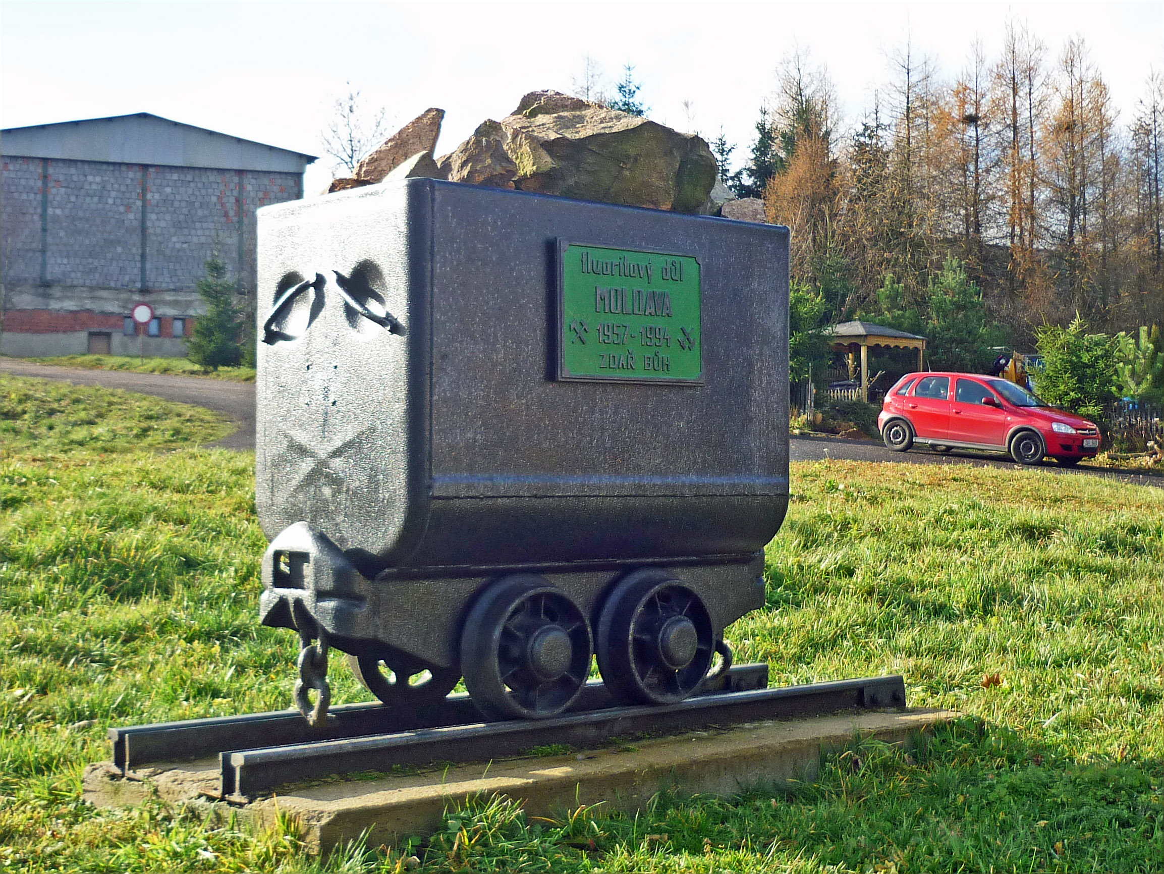 Bergbau-Hunt in Moldau/Moldava, der an den Fluorit-Abbau von 1957 bis 1994 im Ort erinnert